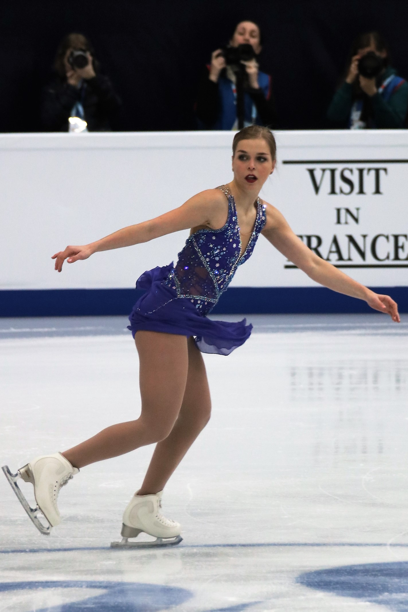 Николь Райичова (Словакия) на Чемпионате Европы по фигурному катанию 2018.